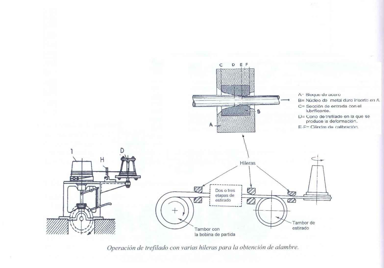 Operacion de trefilado con varias hileras para la obtenion del alambre